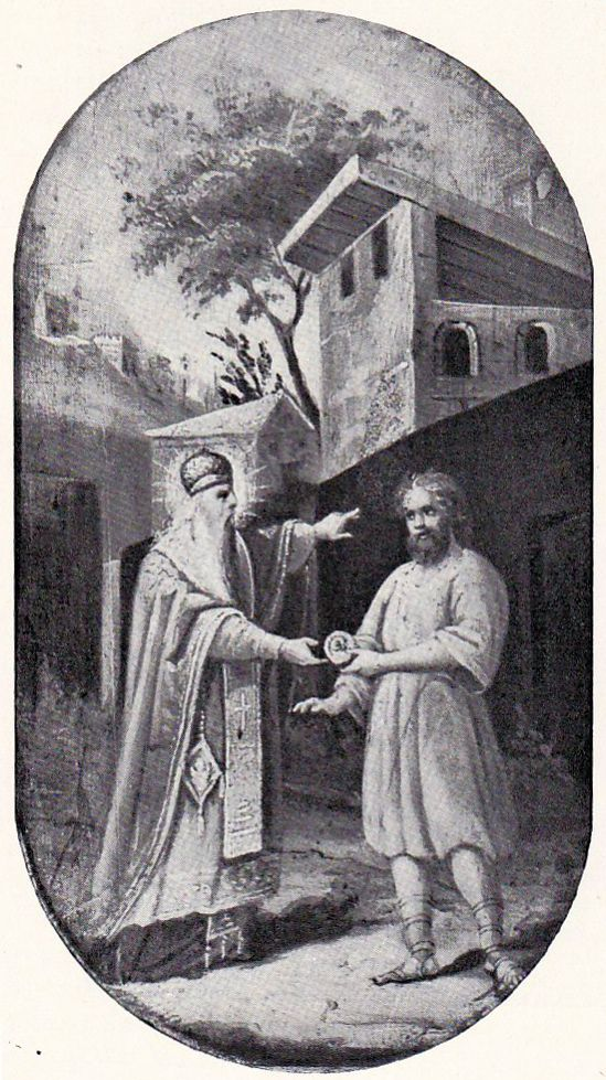 Nicolae Grigorescu - Medalion din Icoana Sfântului Spiridon de la biserica Alexe din București, intitulat Sfântul Spiridon și țăranul'.'